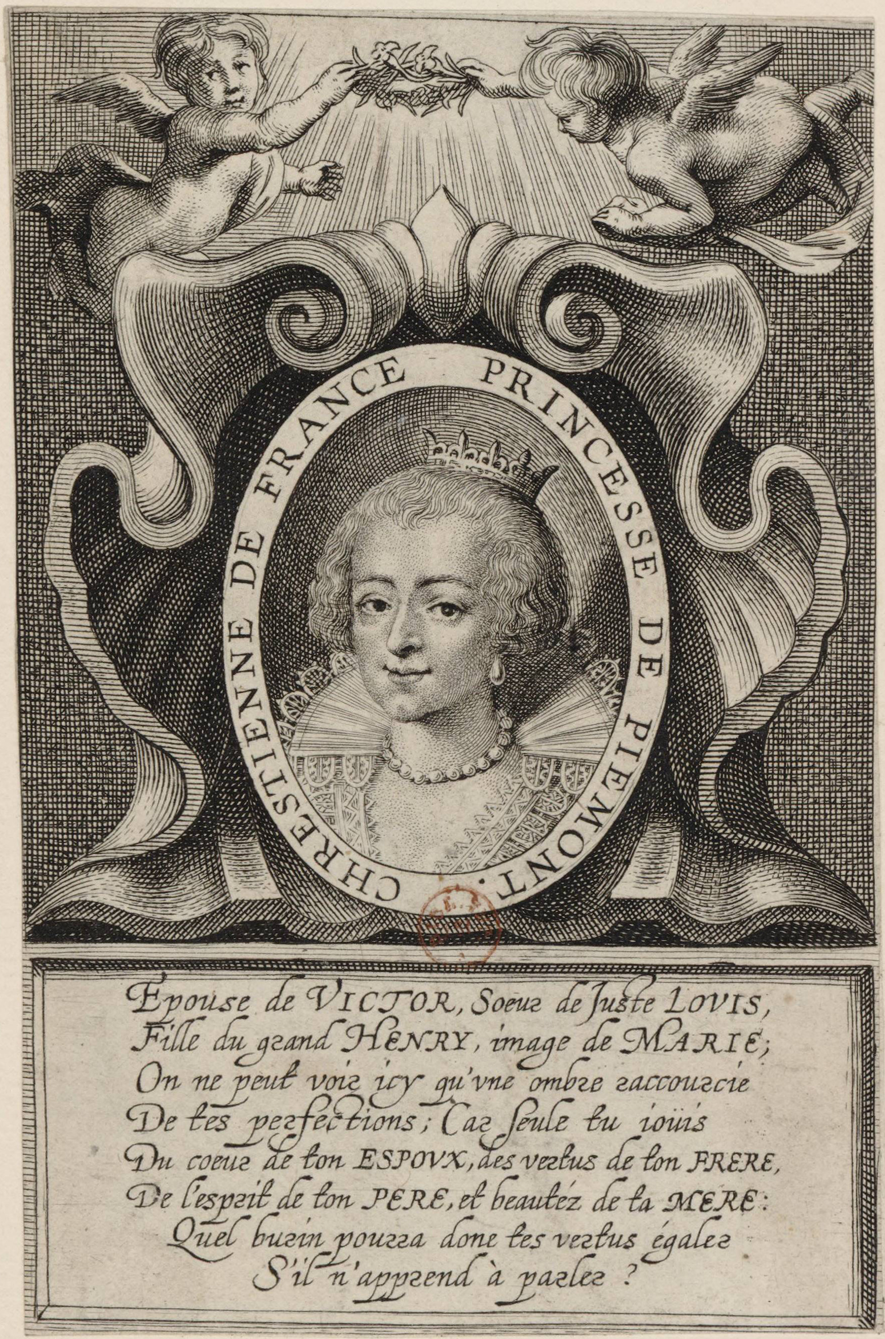 Portrait de Christine de France, Duchesse de Savoie, en buste, de 3/4 dirigé à gauche dans un médaillon ovale